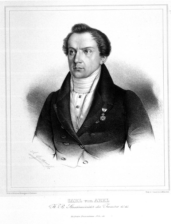 Der bayerische Politiker und Minister Karl von Abel (1788-1859)